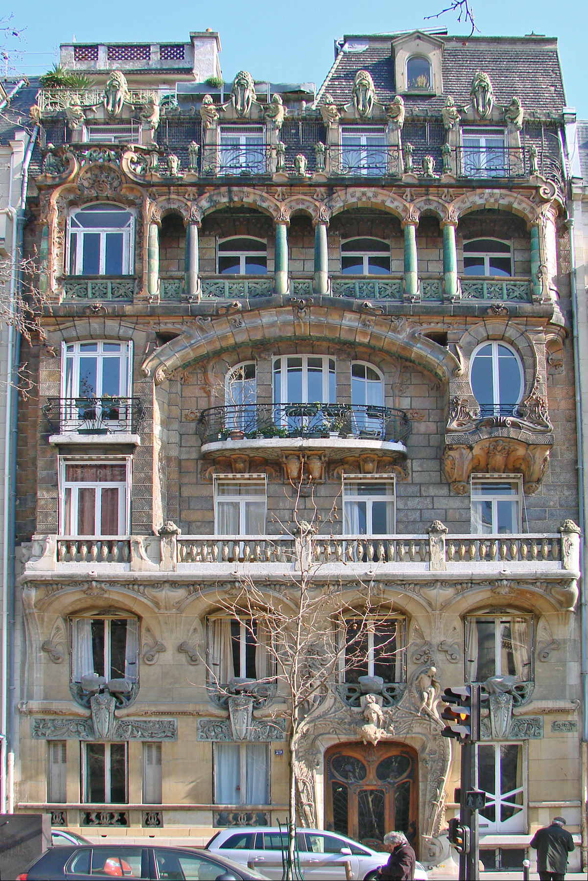 Façade de l'immeuble du 29, avenue Rapp, à Paris. Cet immeuble de style art nouveau, situé 29, avenue Rapp à Paris, a été conçu en 1900-1901 par l'architecte Jules Lavirotte. Il est considéré comme son chef d'oeuvre. Il a été primé au concours de façades de la ville de Paris de 1901 (1903 selon le panneau histoire de Paris ?). Selon certains spécialistes de l'art nouveau, il n'aurait pas appartenu à Alexandre Bigot comme l'indique le panneau sur l'histoire de Paris placé devant l'immeuble. La façade est couverte de céramiques d'Alexandre Bigot qui a travaillé avec la plupart des grands architectes de style art nouveau. Les sculptures sont de Théobald-Joseph Sporrer, Firmin Michelet, Alfred Jean Halou et Jean-François Larrivé La façade sur rue et la toiture sont inscrites monument historique par arrêté du 16 octobre 1964 NB La qualité des céramiques d'Alexandre Bigot mérite d'être signalée car plus d'un siècle après avoir été posées, leur état reste remarquable.